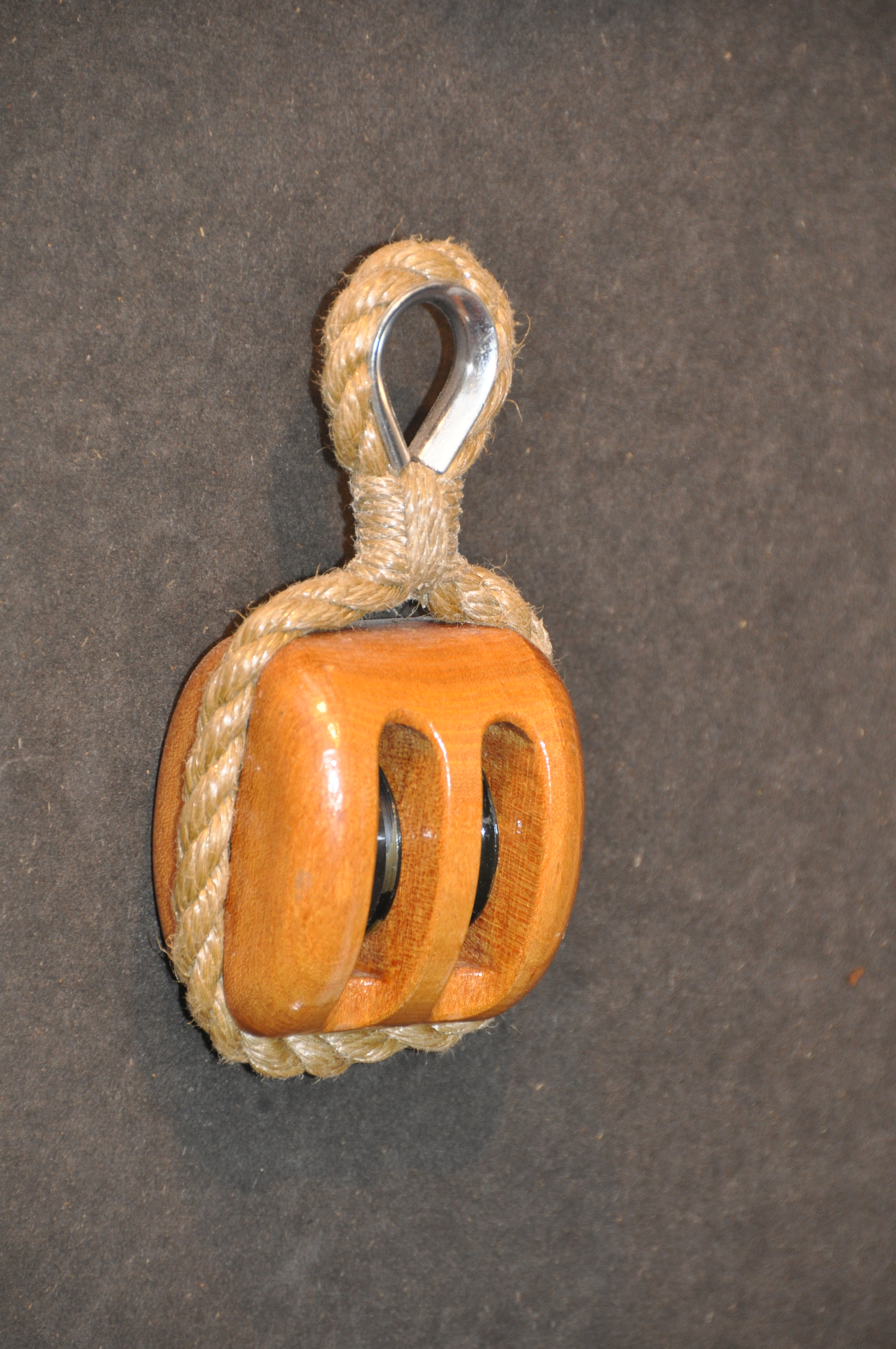 METS 2009 Blocks made by Ording in Almere, The Netherlands